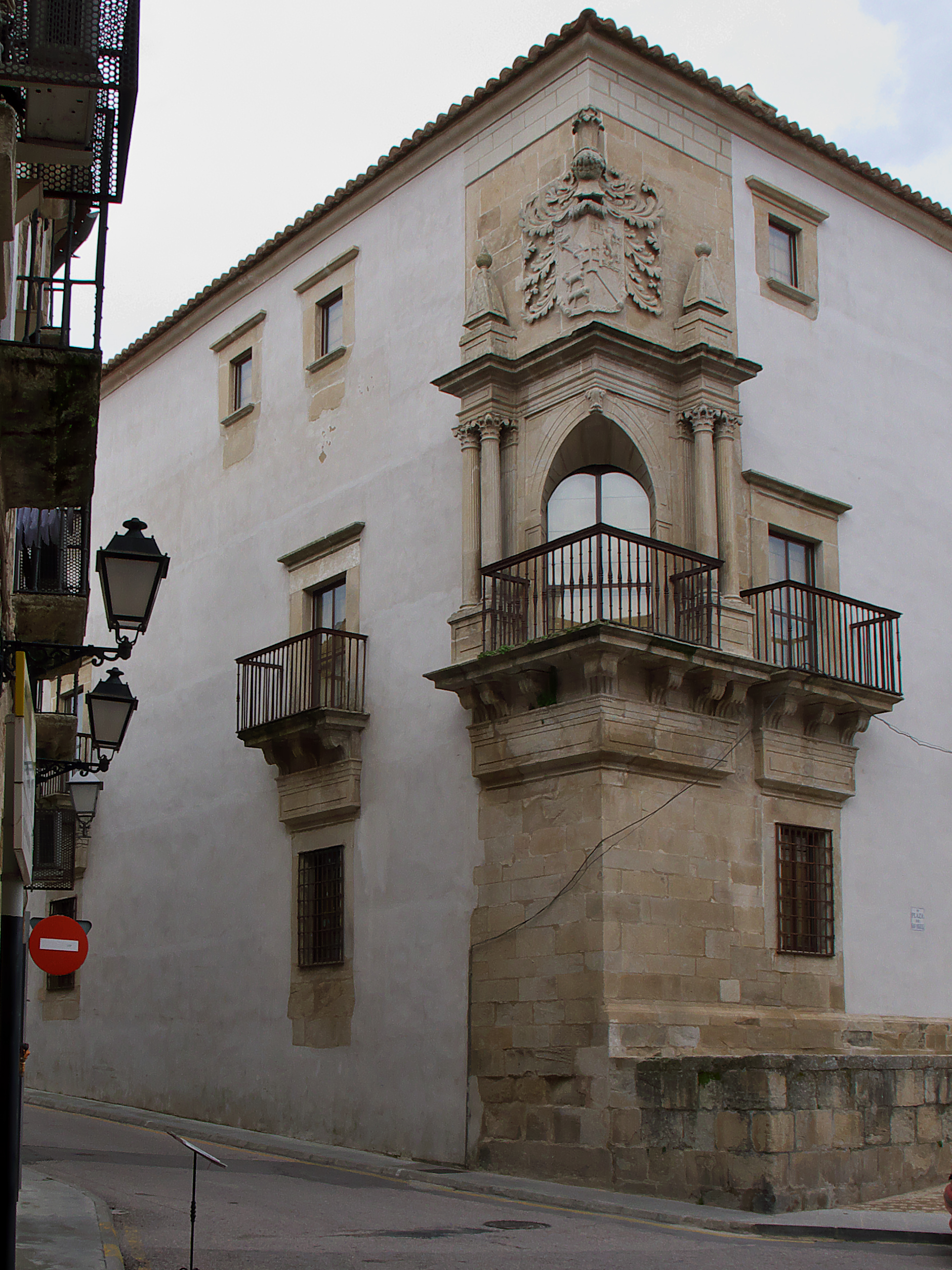 También denominado Palacio Barrantes-Cervantes. En este palacio nació Gaspar Cervantes de Gaeta.